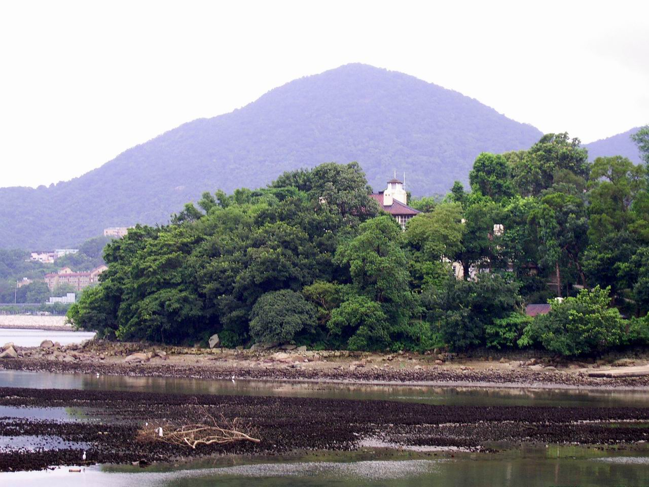 中文（香港）: 元洲仔前政務司官邸